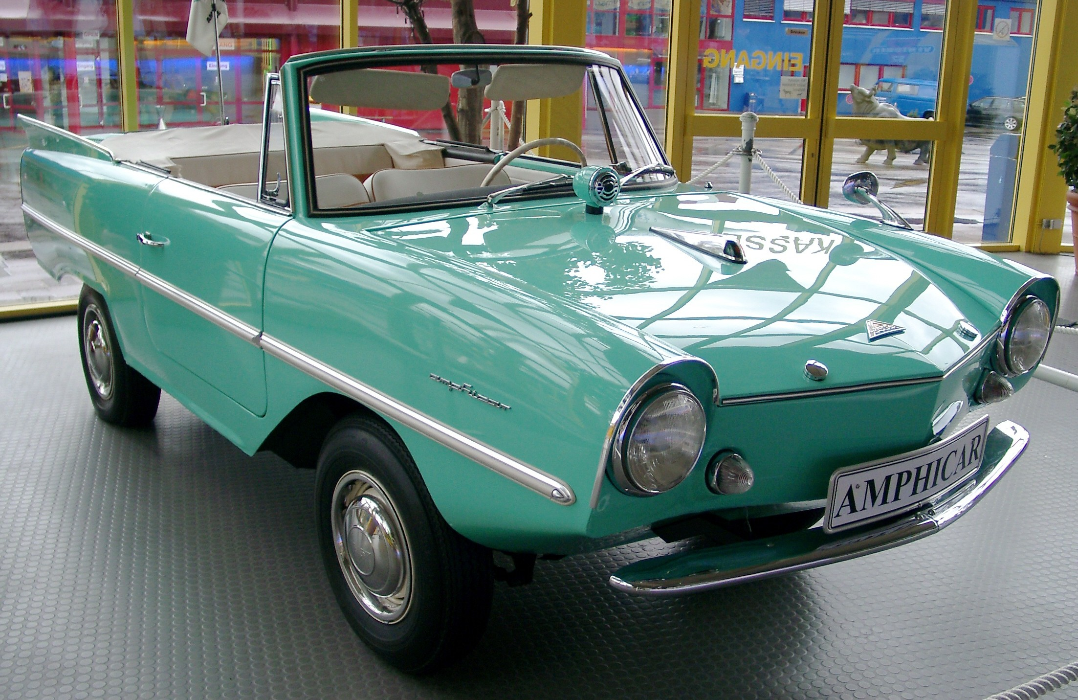 Amphicar, fotografiert im Auto- und Technikmuseum Sinsheim Germany